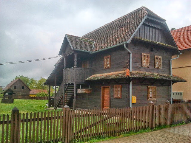 Tradicijska okućnica, Zagrebačka 7